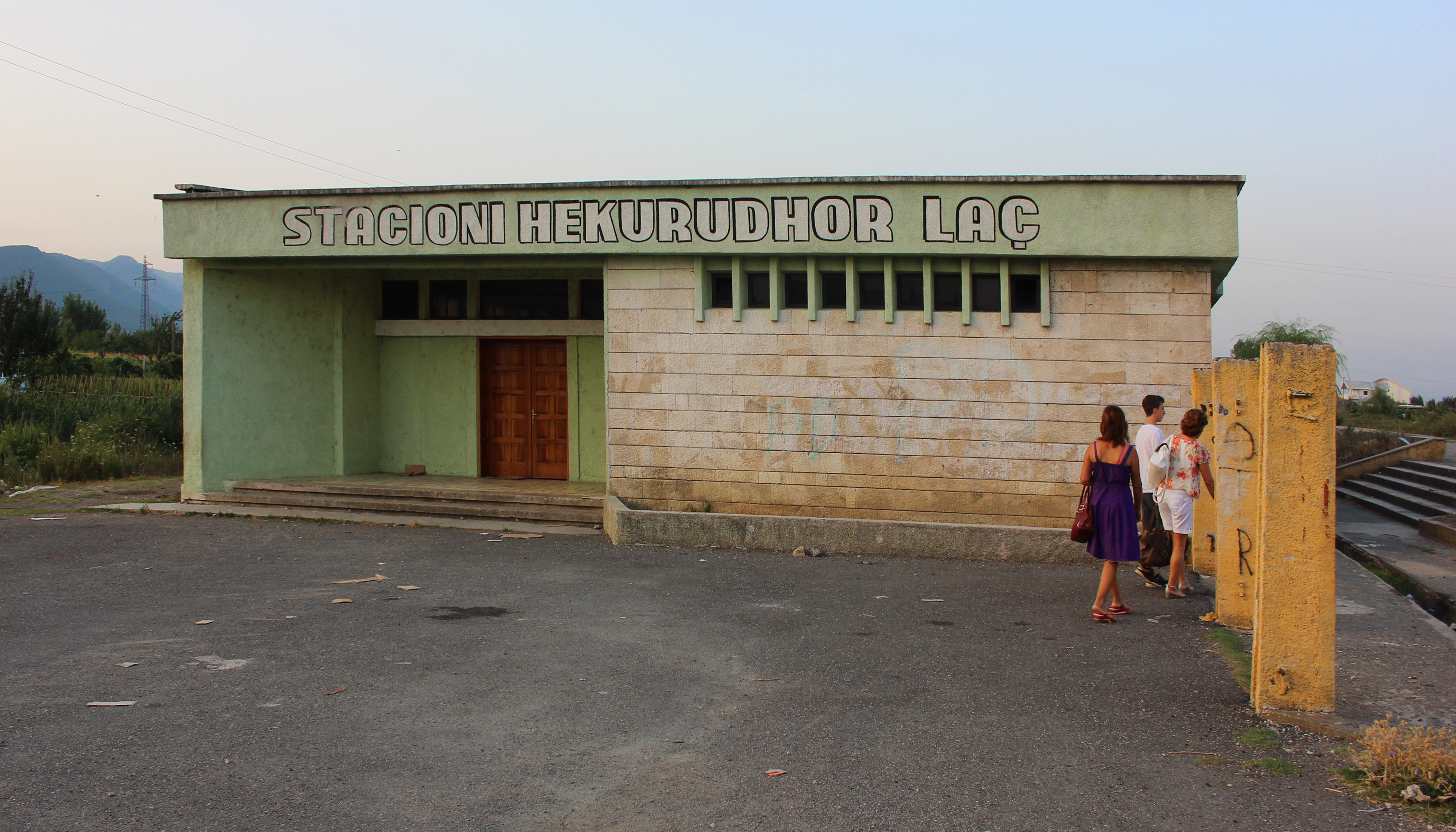 Der Bahnhof von Laç in Albanien.